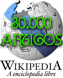 Logo creado por Banjo como proba para o logo conmemorativo dos 30.000 artigos da Galipedia.